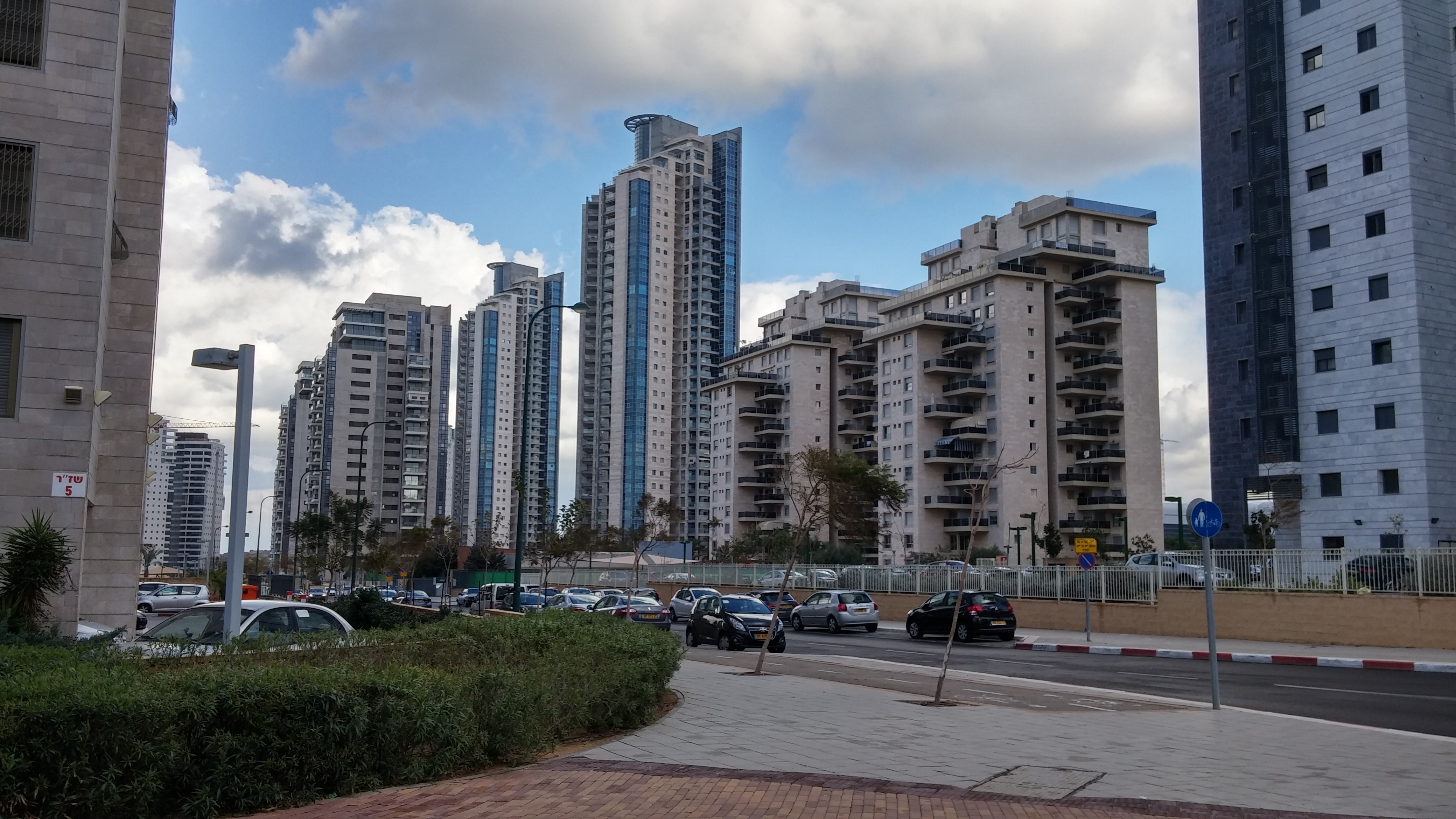 עיר ימים, נתניה